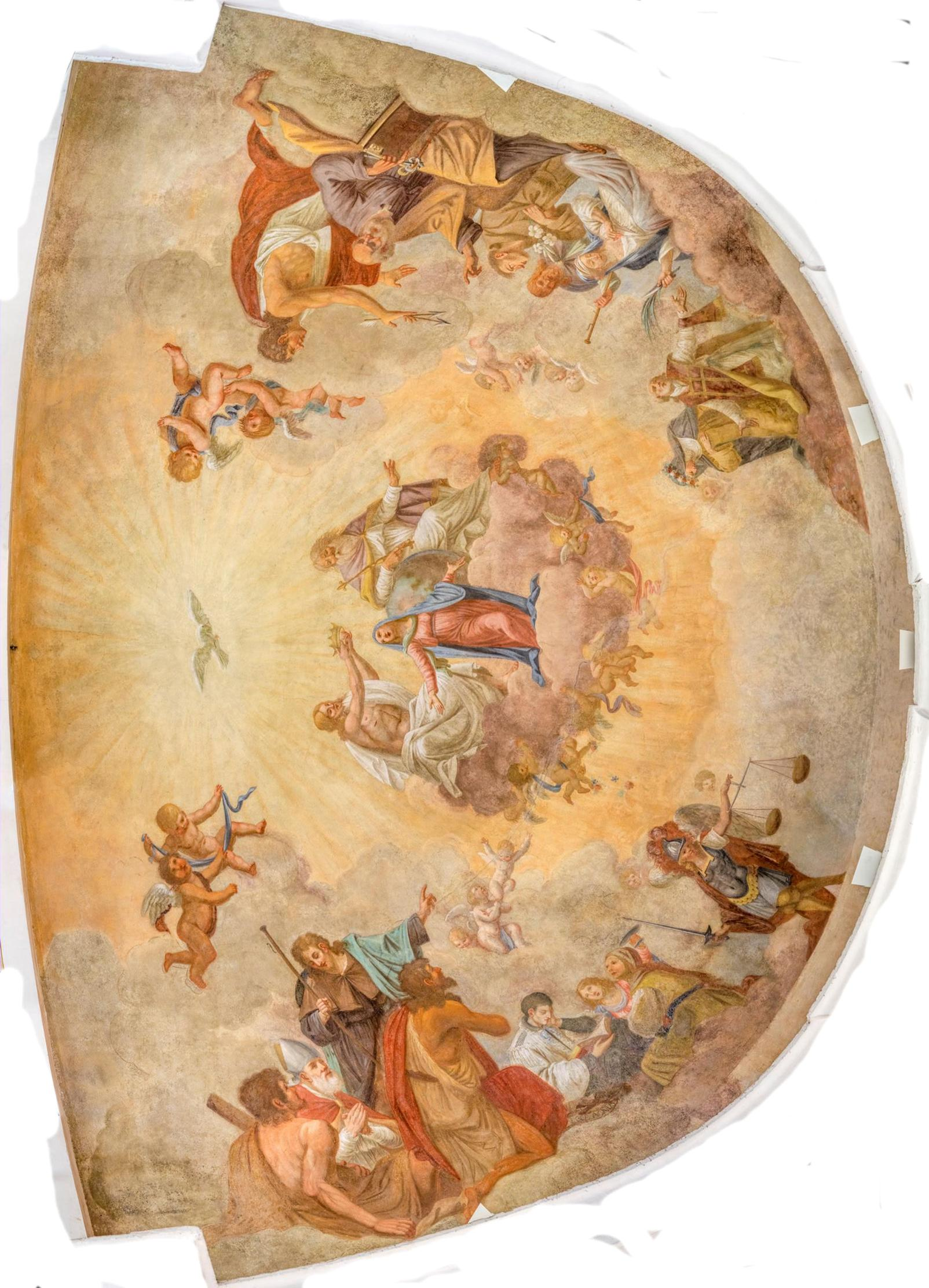 Abside della chiesa di san Martino vescovo, Borgo del Ponte, Massa. La Trinità incorona Maria regina del cielo e della terra. La composizione suggerisce un forte richiamo al Pellegrinaggio, alla via Francigena sul cui tracciato la chiesa si trova.